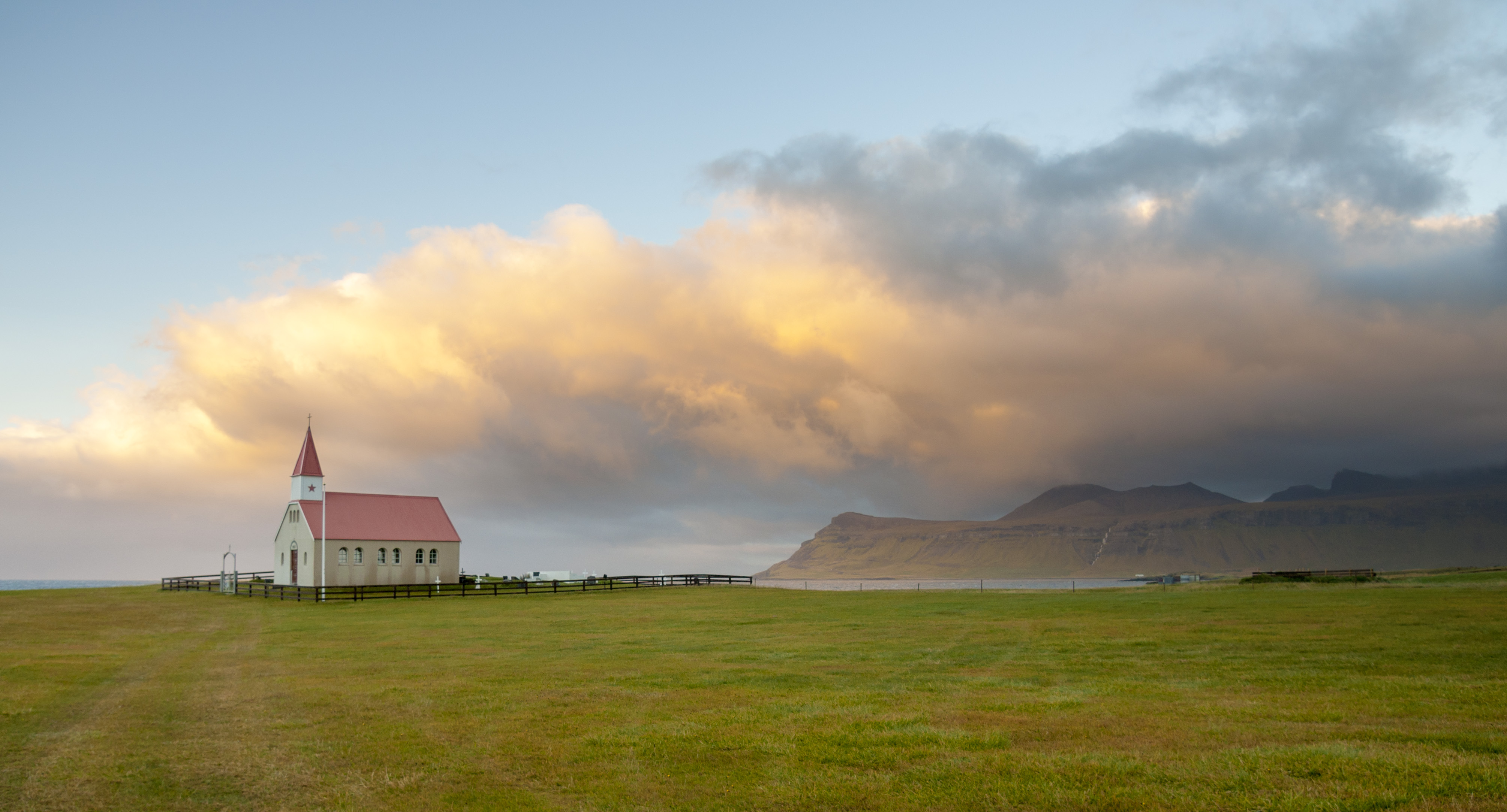 Un cielo simplemente espectacular